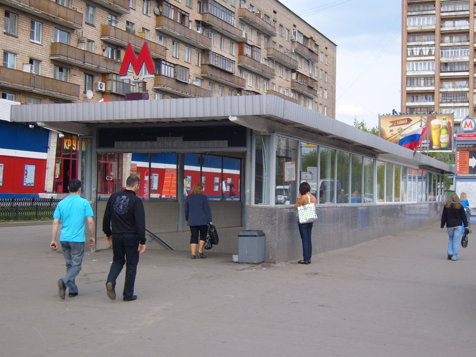 Вестибюль станции метро Преображенская площадь (vestubul of station of Moscow metropolitan Preobrazhenskaya ploshad)